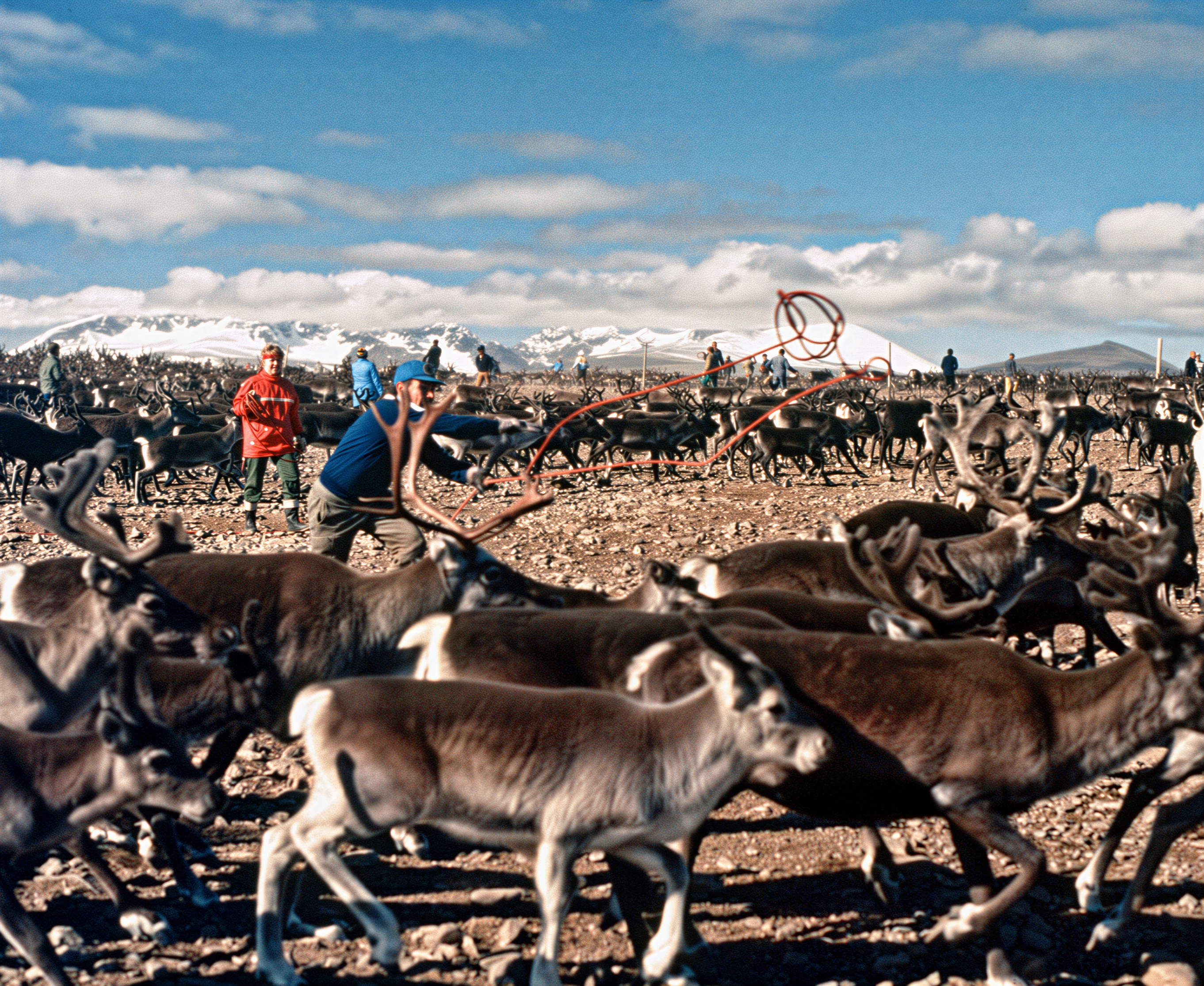 Rentierscheidung in der Nähe von Nikkaluokta, Schweden. 1989.